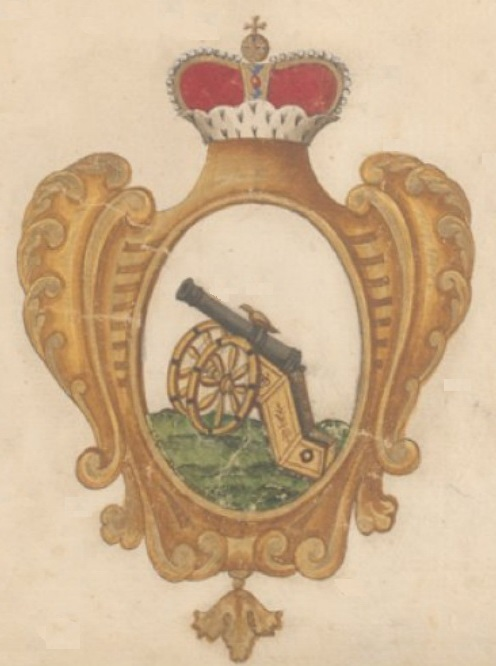 Герб Смоленска в Знаменном гербовнике Миниха 1730 года в исполнении Ф. Санти.